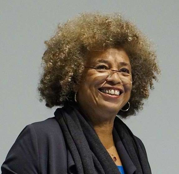 Angela Davis